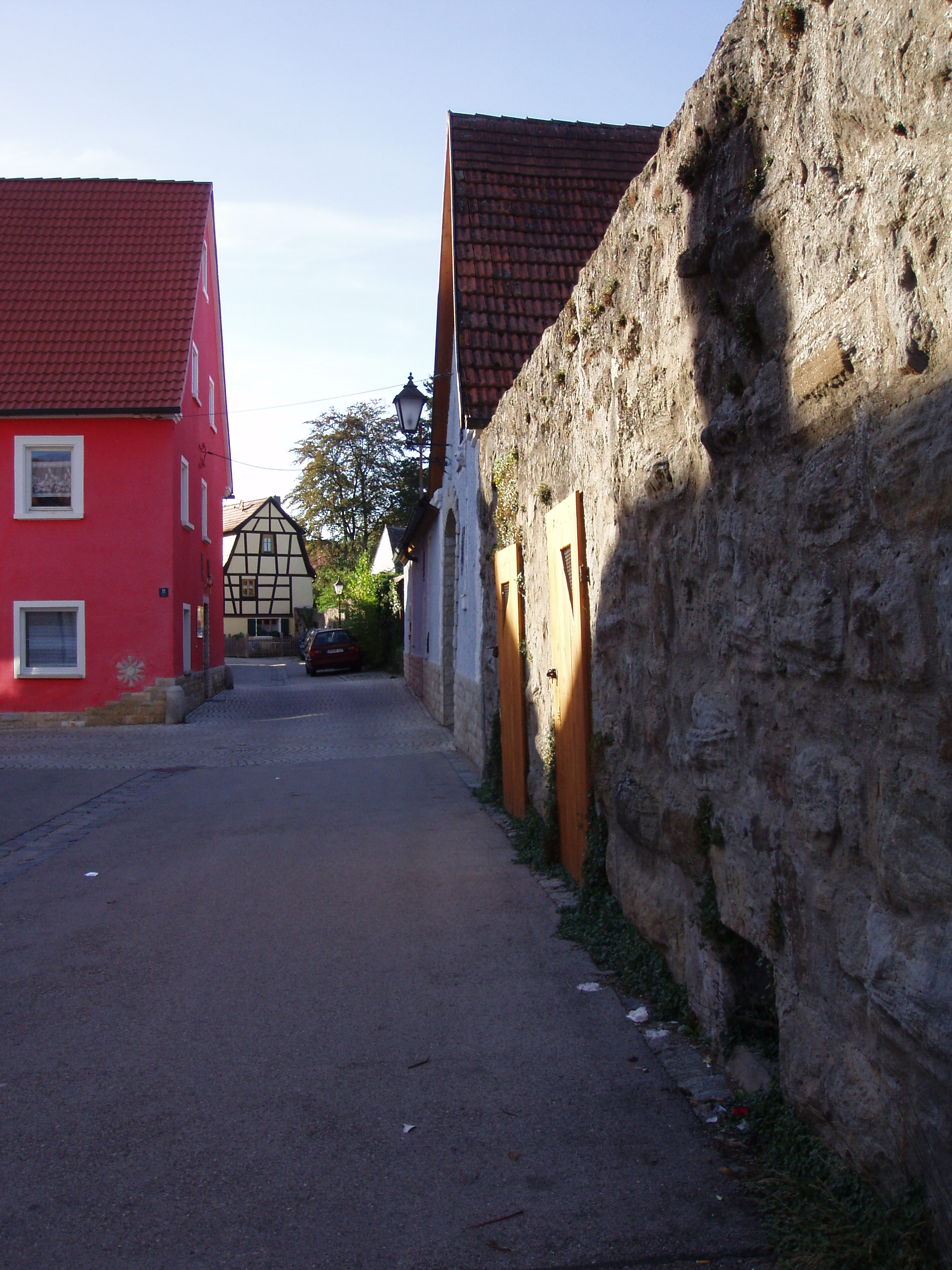 Herrieden, Partie an der Stadtmauer